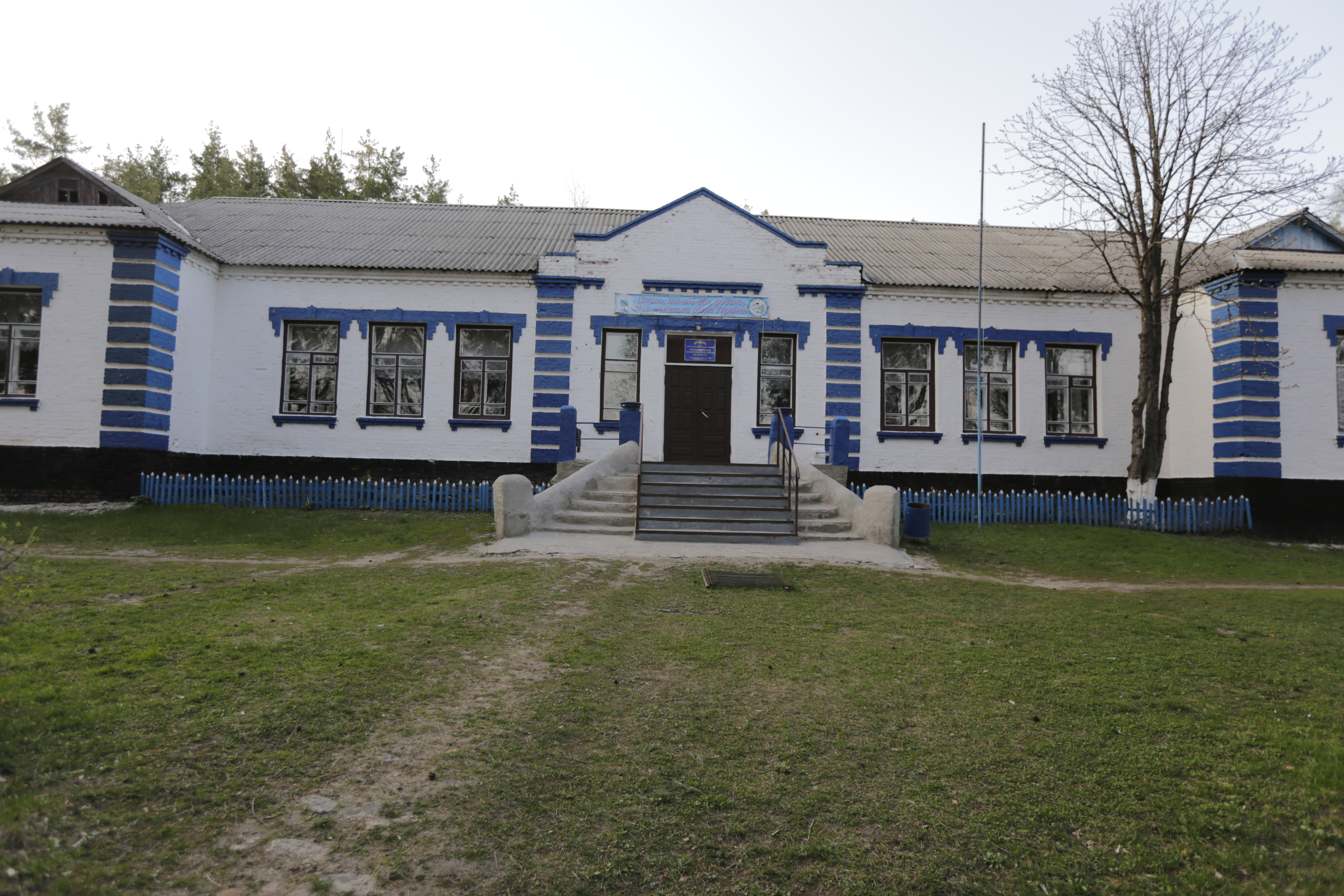 Харківська область - Валківський район - Олександрівка - Школа